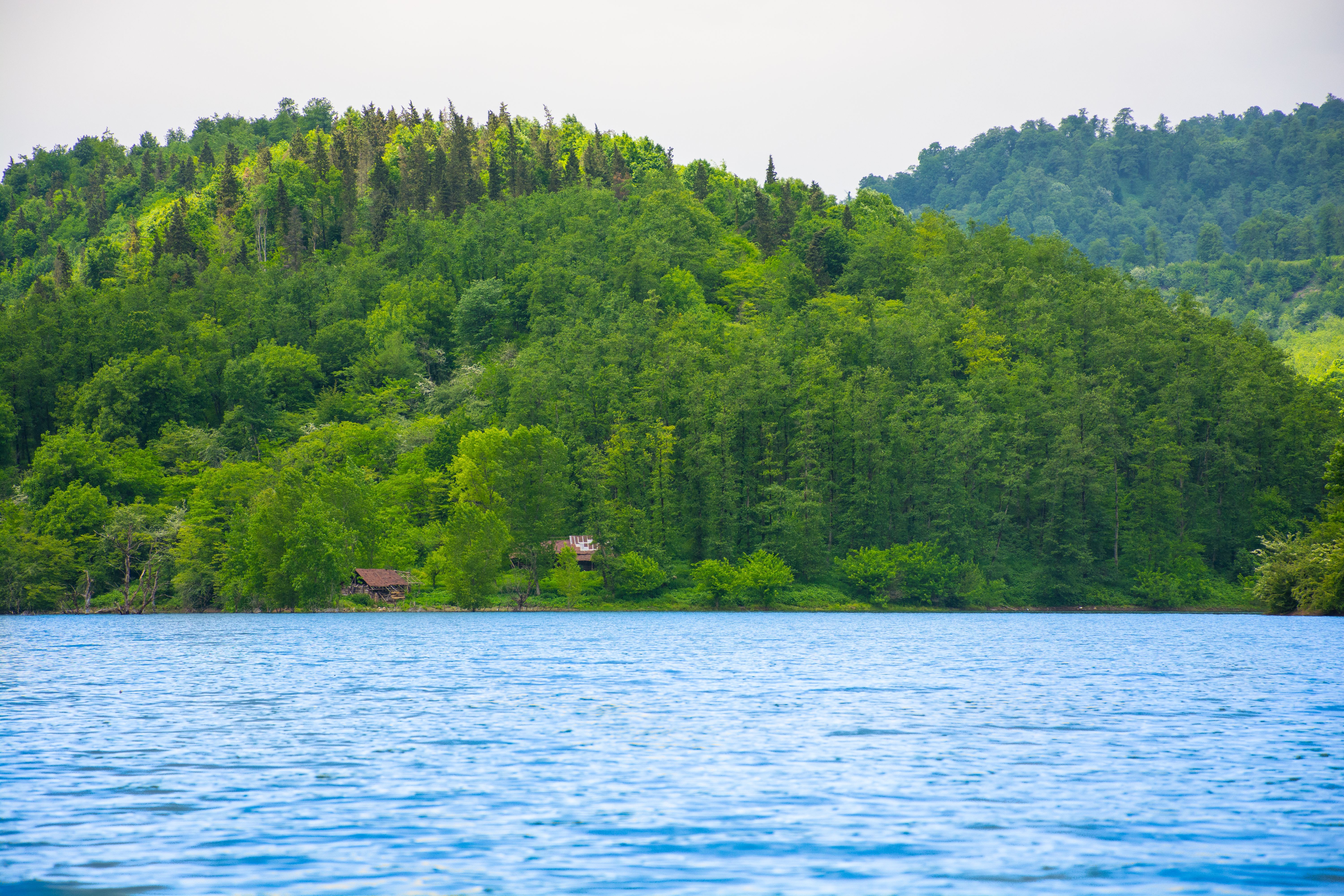 نمایی از دریاچه و چشم‌انداز شرقی